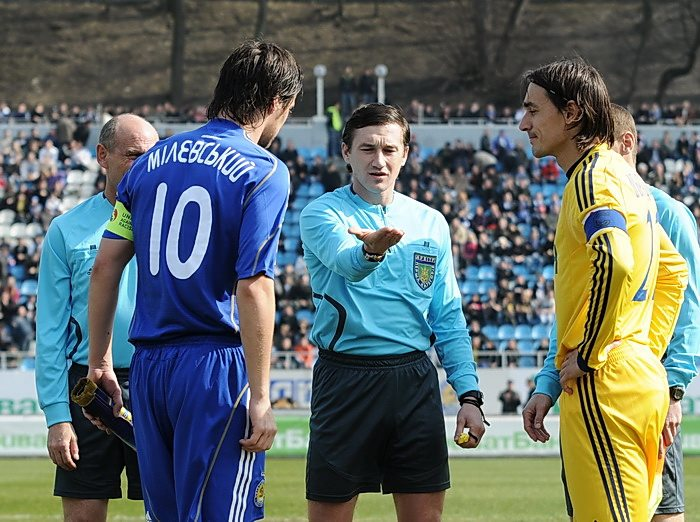 Початок матчу між Динаом та Металістом